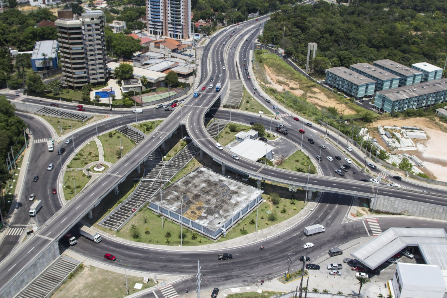 Rotatória do cruzamento entre as avenidas Efigênio Salles e André Araújo. É conhecido como Complexo Viário Gilberto Mestrinho ou Viaduto do Coroado.)